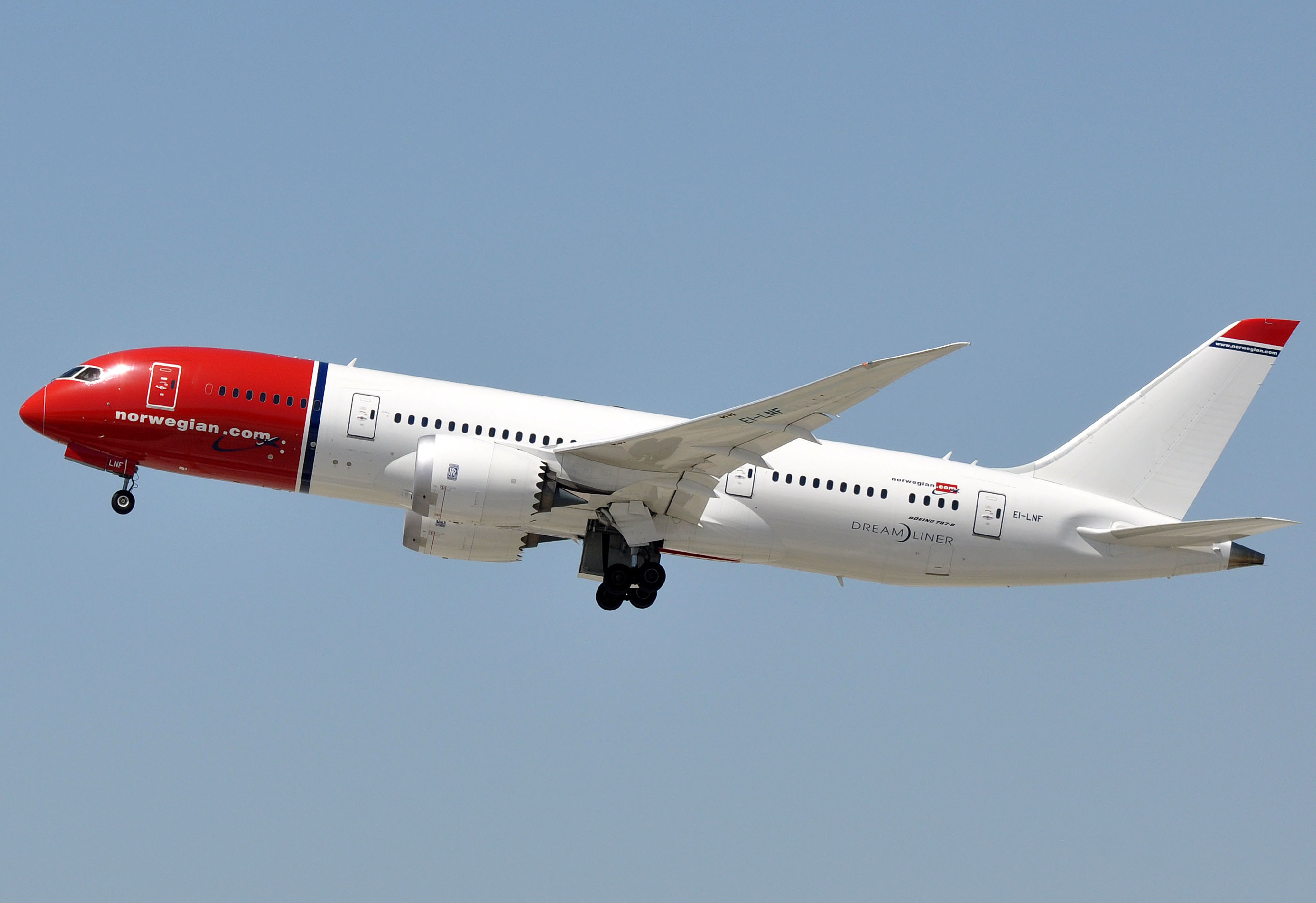 MSN 35313 LN 178 B787-8 / 787 / 787-8 NORWEGIAN LONG HAUL LAX AIRPORT NOW LN-LNF